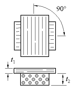 Skizze eines ausgeglichenen Winkelverbundes mit unterschiedlichen Schichtdicken.